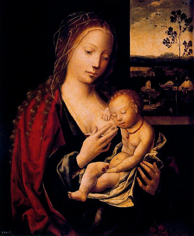 La virgen dando el pecho al Niño Jesus. Tabla 60x47 cm. Museo del Prado (Madrid)